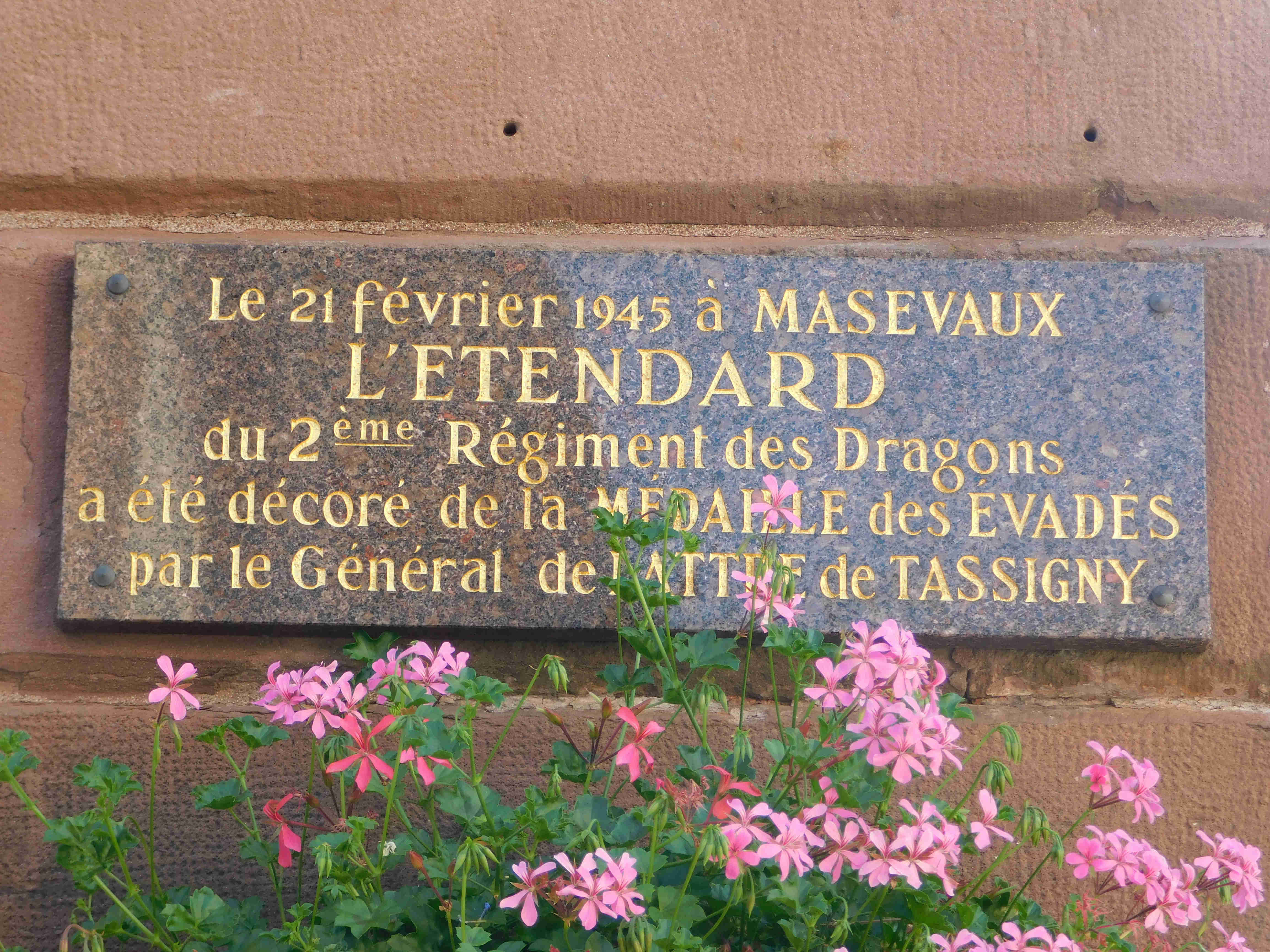 2eme regiment des Dragons Massevaux (68)